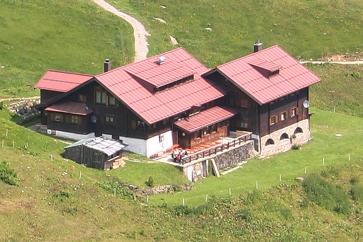 Schwarzwasserhütte - Alpenvereinshütte der Sektion Schwaben im Kleinwalsertal